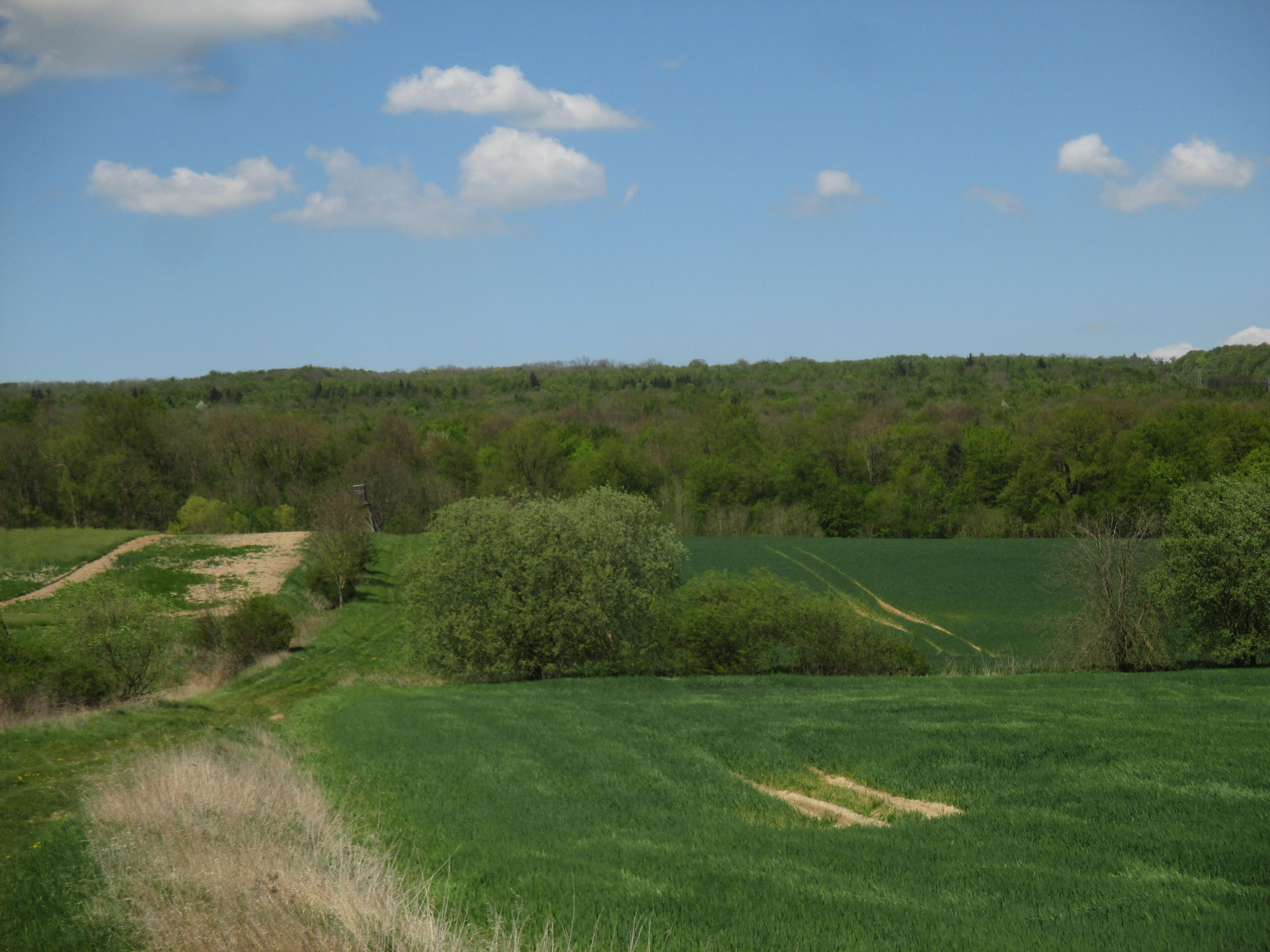 Mühlhäuser Hardt, südlicher Waldrand.